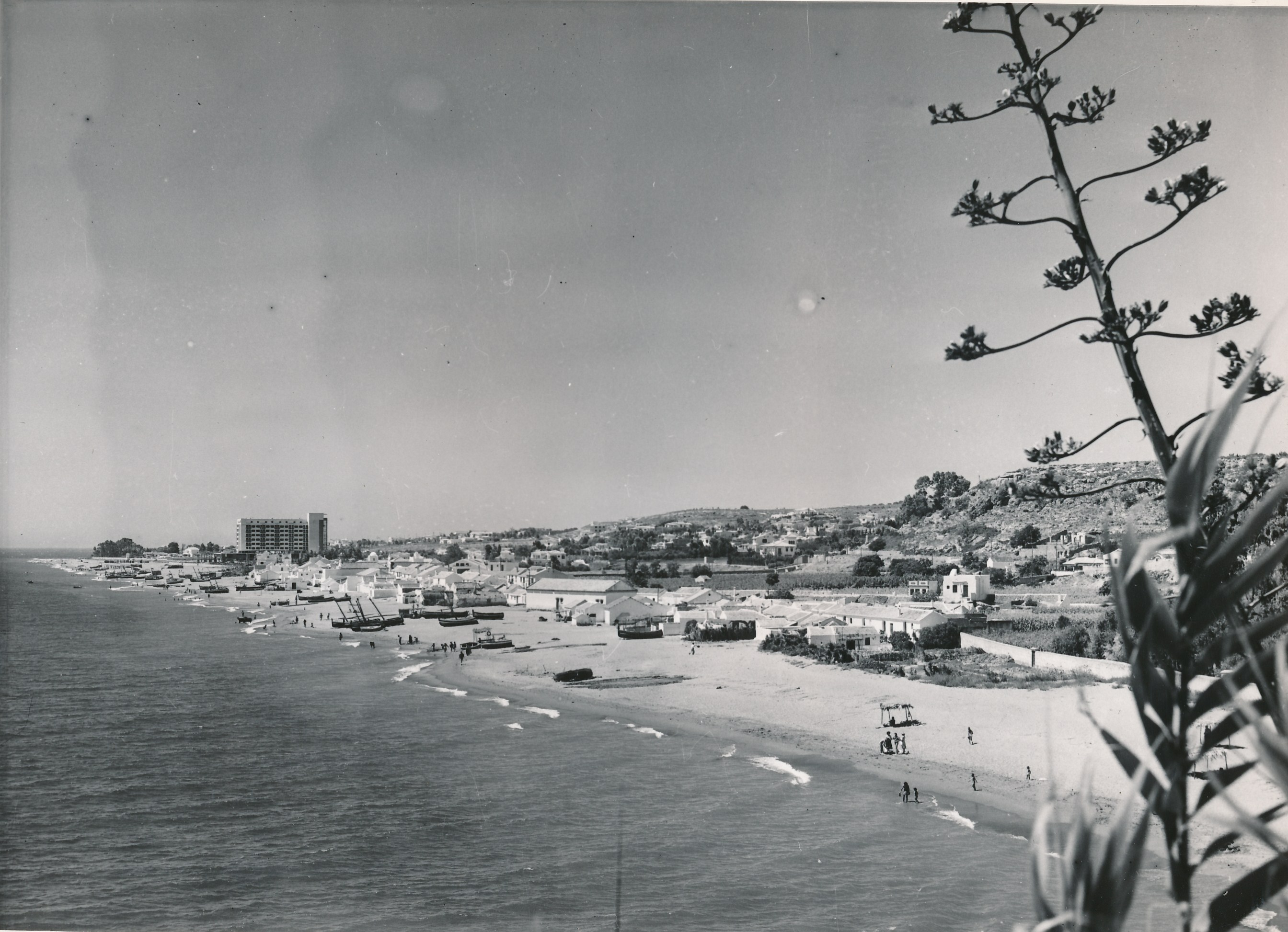 Torremolinos (Málaga), enero 1960 Procedencia: Archivo Fotográfico de la Dirección General de Turismo (1951-1992) Fotógrafo: Ministerio de Información y Turismo Registro nº: 00012 Signatura: Caja 1 Fondos: Biblioteca de la Facultad de Empresa y Gestión Pública (Universidad de Zaragoza) Legado: Luis Fernández Fuster / E.S. Turismo Huesca